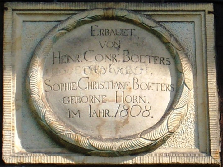 Boetersmühle, Inschrift über dem Eingang